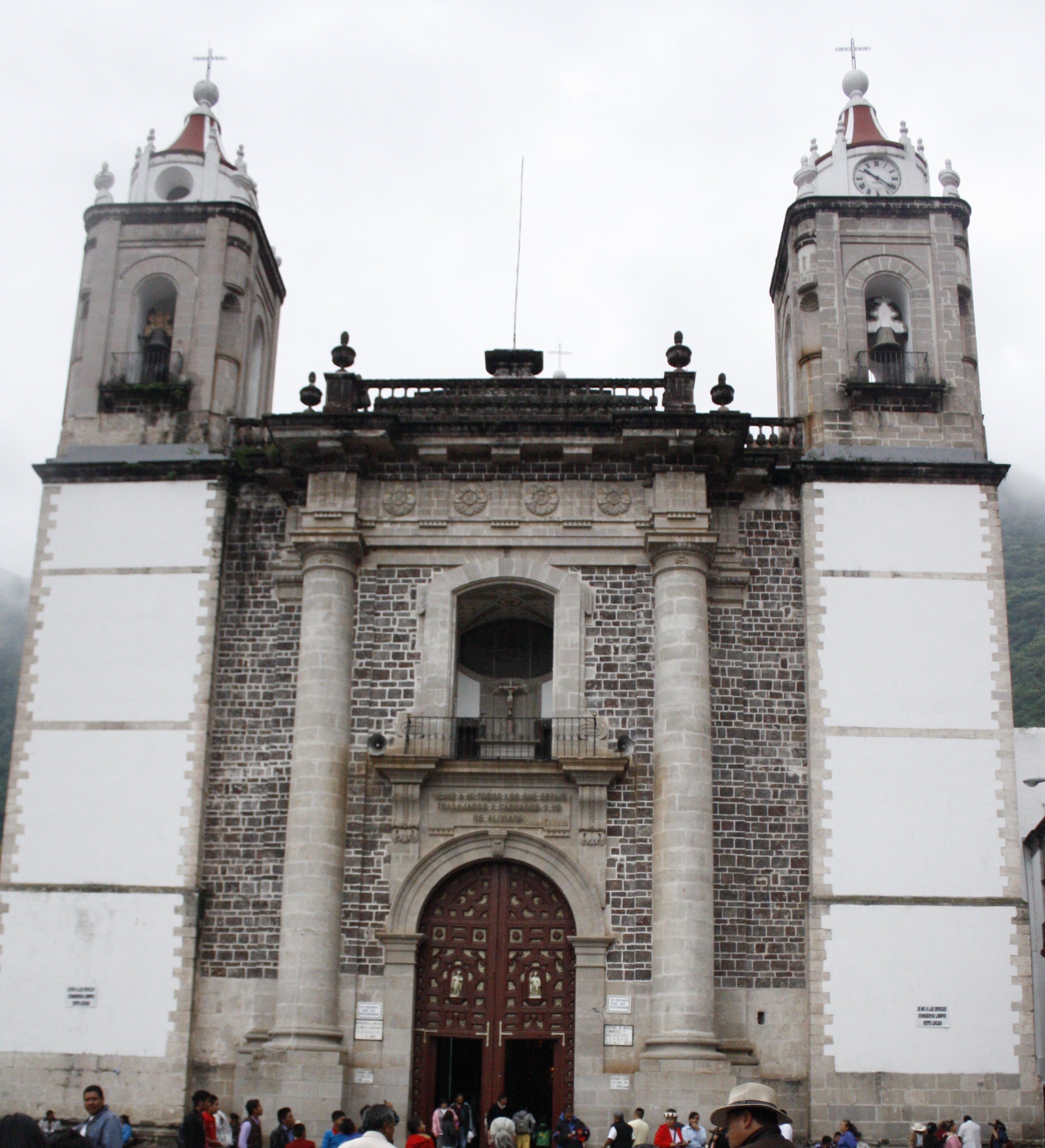 vista de frente del templo del Señor de Chalma